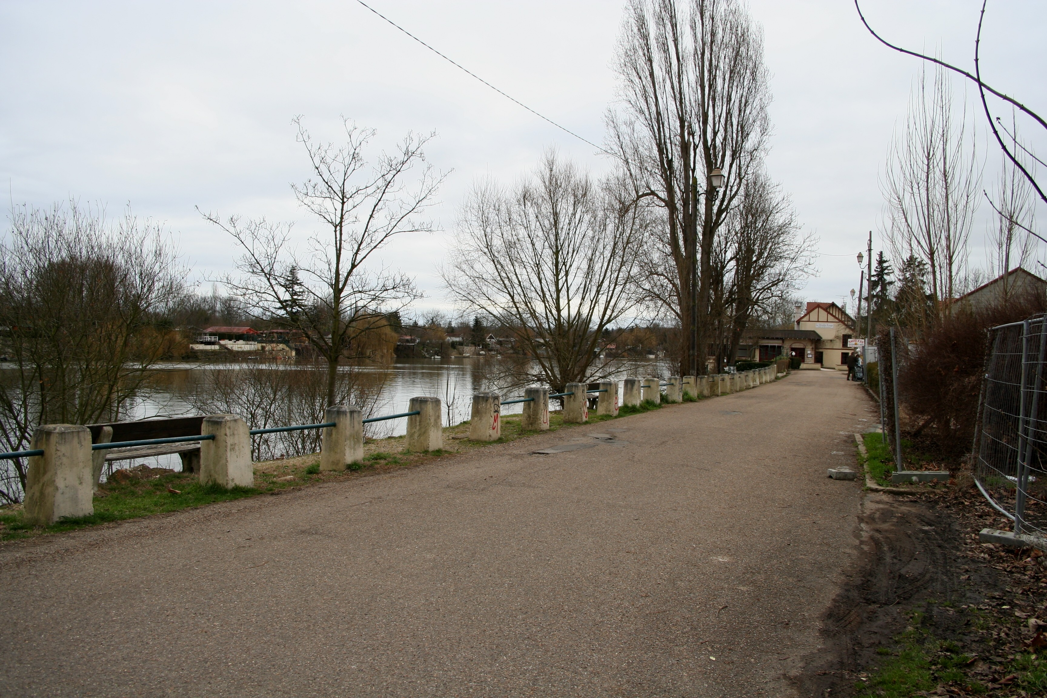 Bord de Seine à Médan - Yvelines (France).